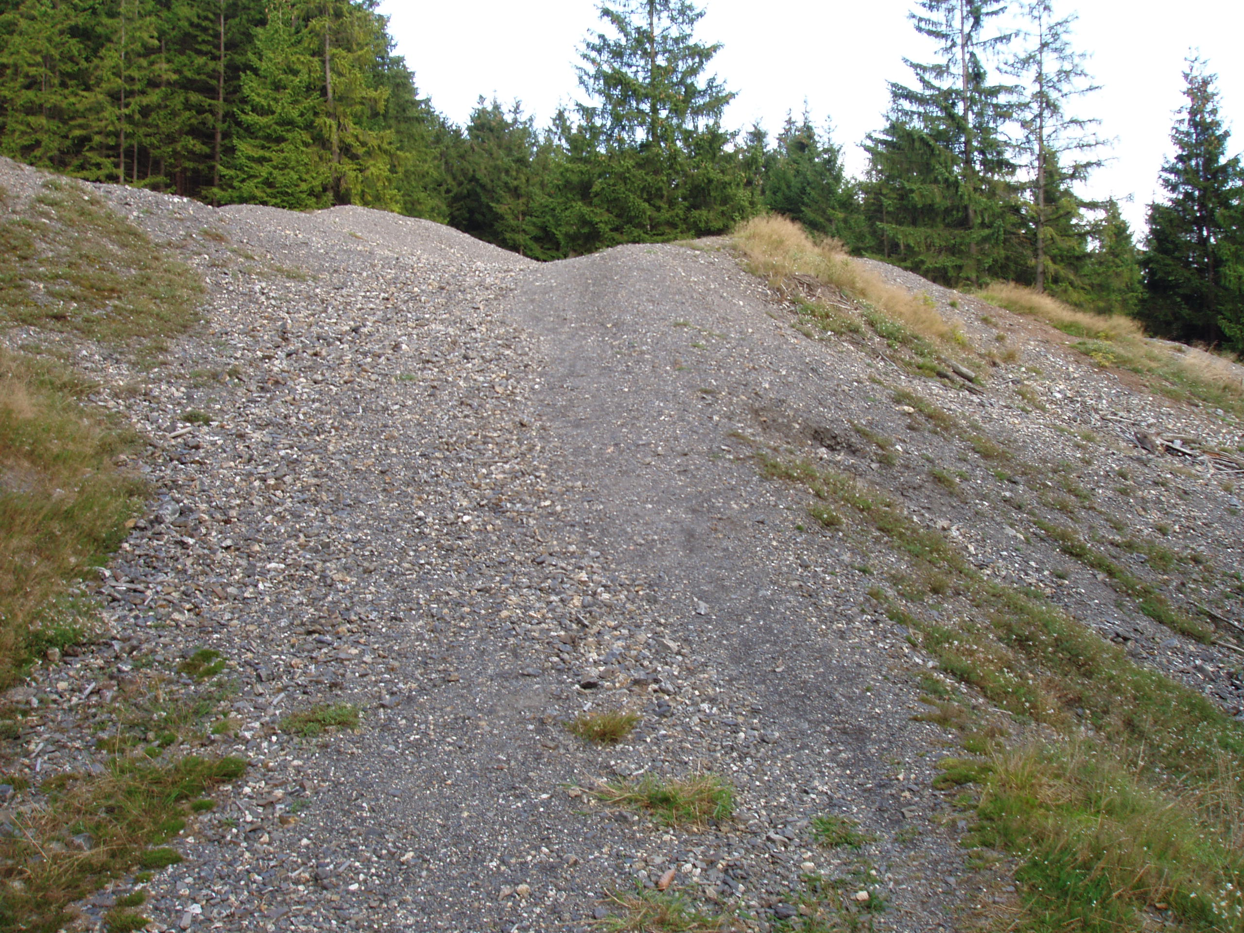 Haldengelände an den Glücksrader Schächten bei Schulenberg im Harz